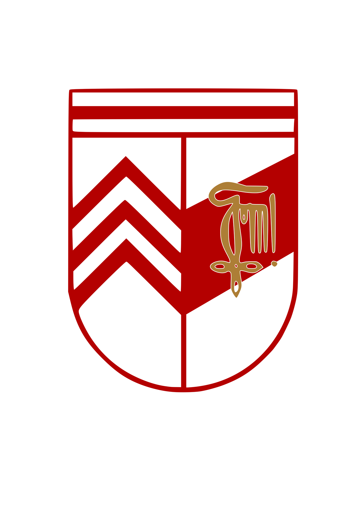 De linkerhelft van het schild van Moeder Meense toont het wapenschild van de stad Menen terwijl de rechterhelft ingevuld wordt met de zirkel.